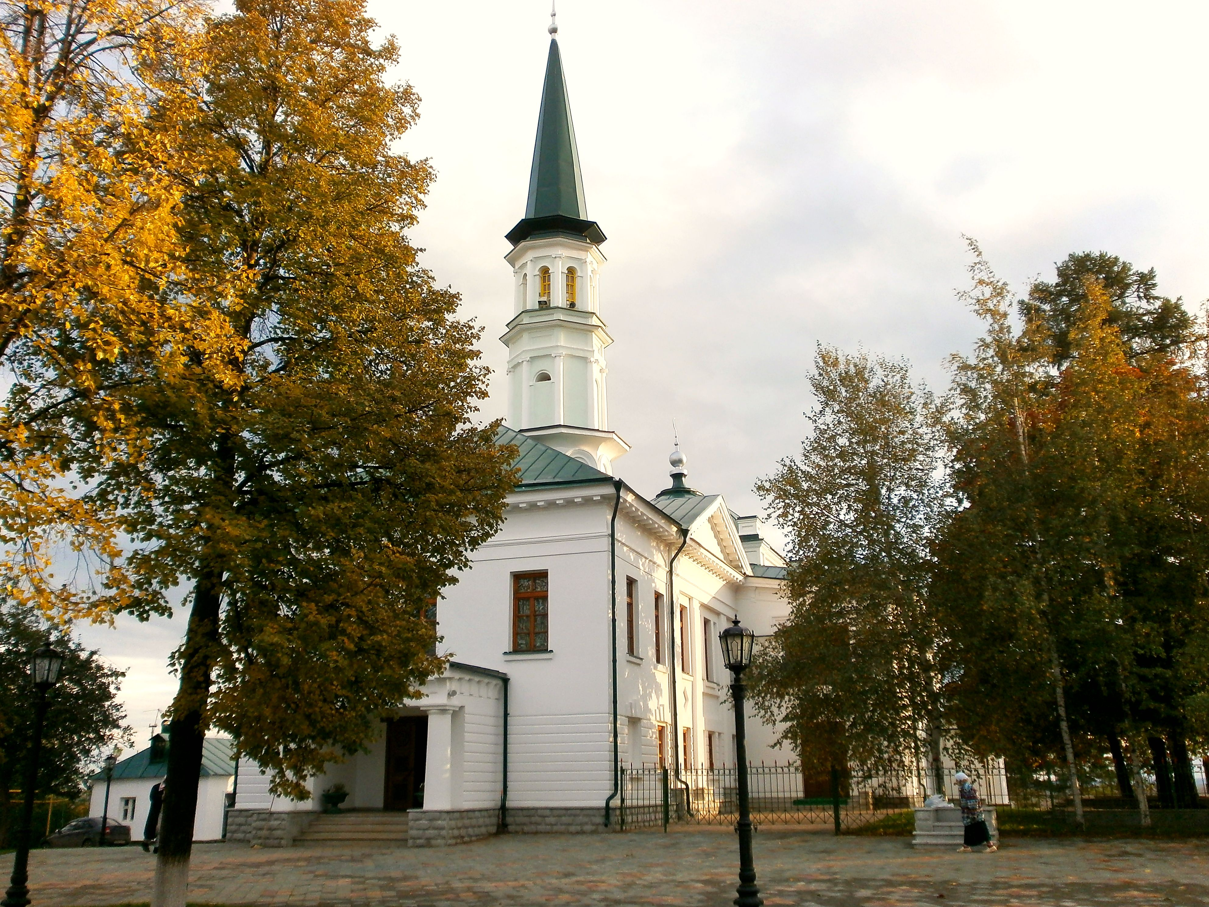 Мечеть при духовном управлении (Республика Башкортостан, Уфа, тукаева улица)